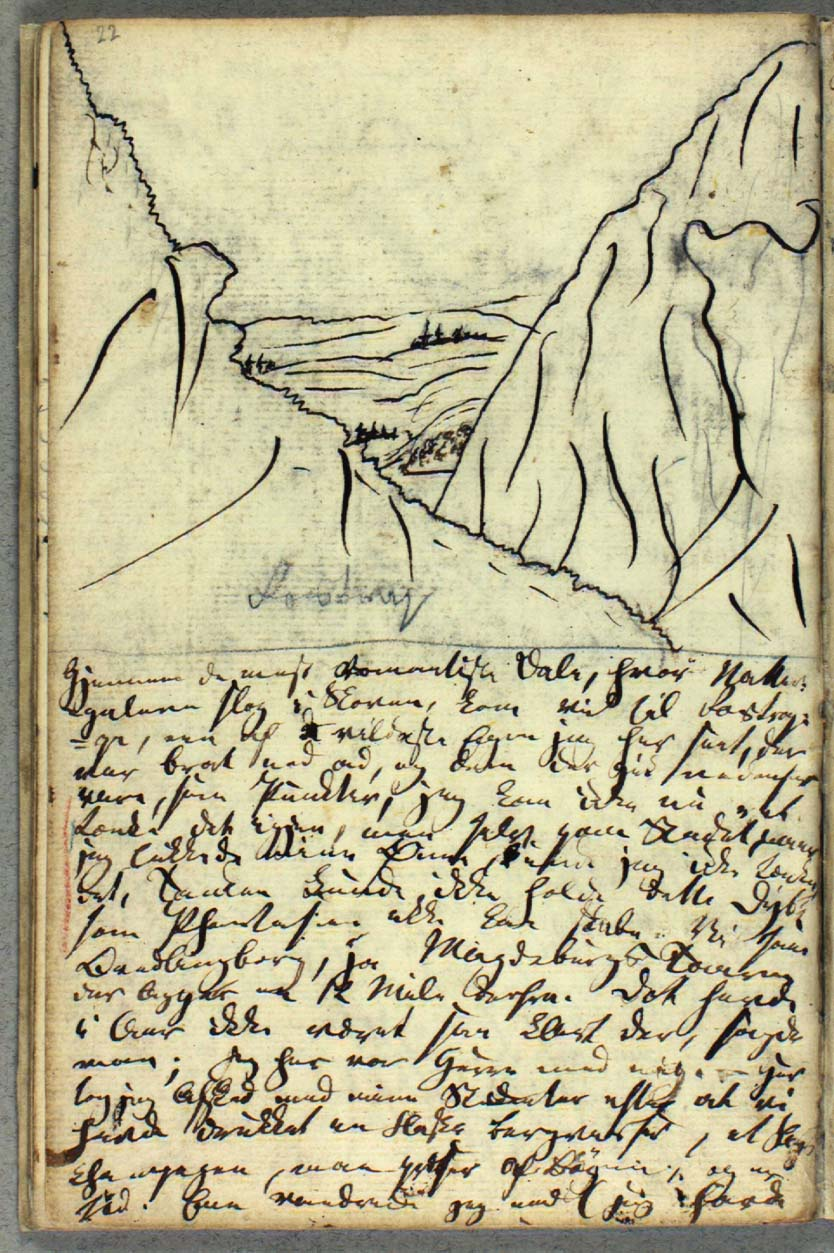 Hans Christian Andersen Diary 1831